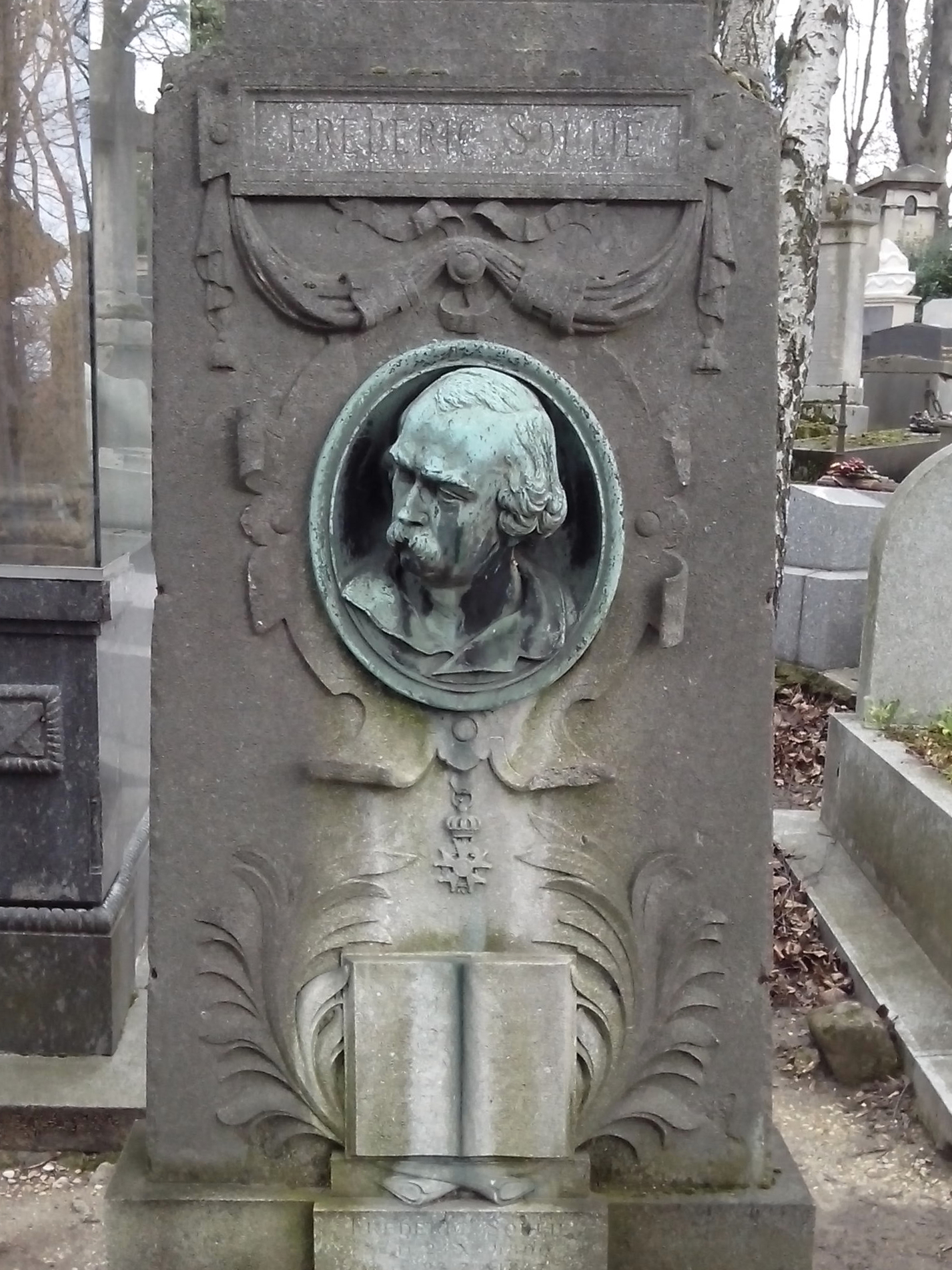 Sépulture du romancier Frédéric Soulié (1800-1847). Tombe ornée d'un buste en bronze par Clésinger.